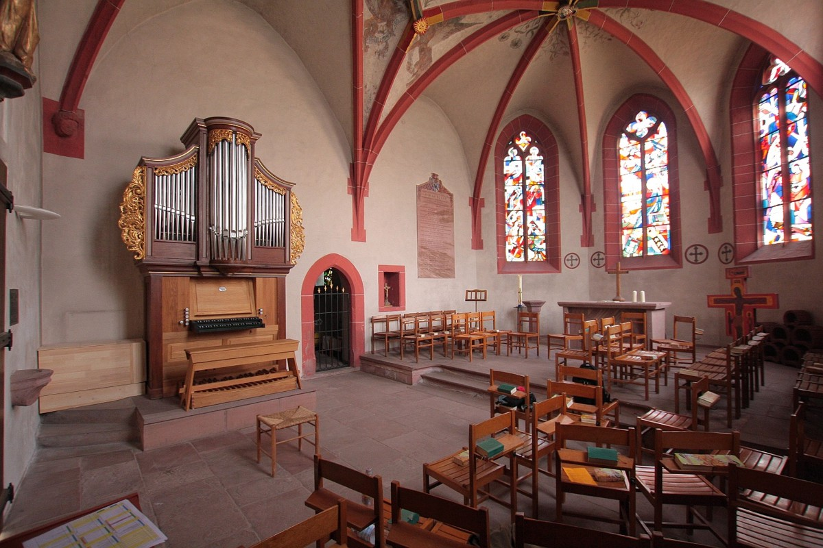 Orgel in der Alten Kapelle Heidelberg